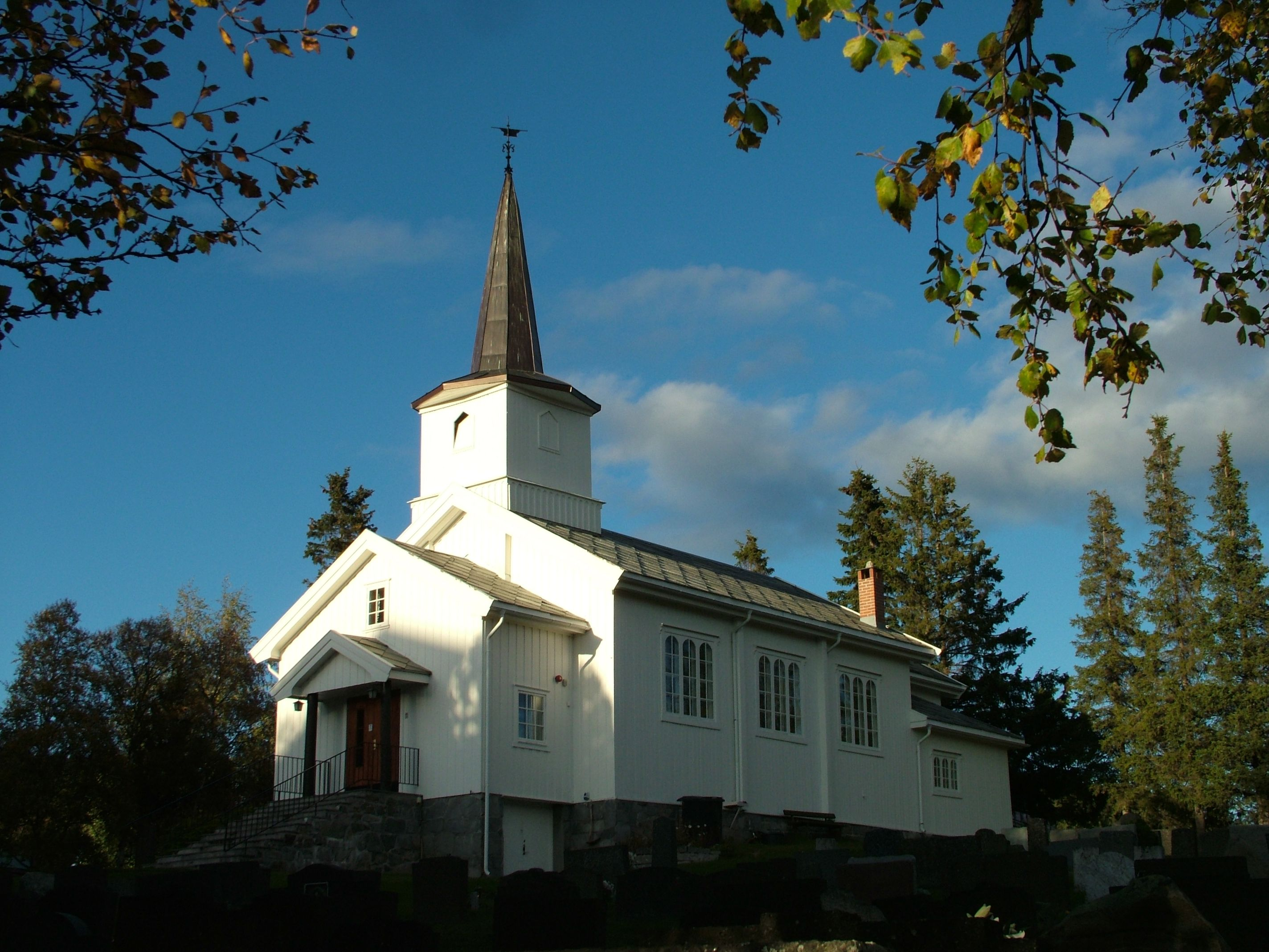 Norwegen, Kommune Hol, Geilo, die Kirche im September 2007